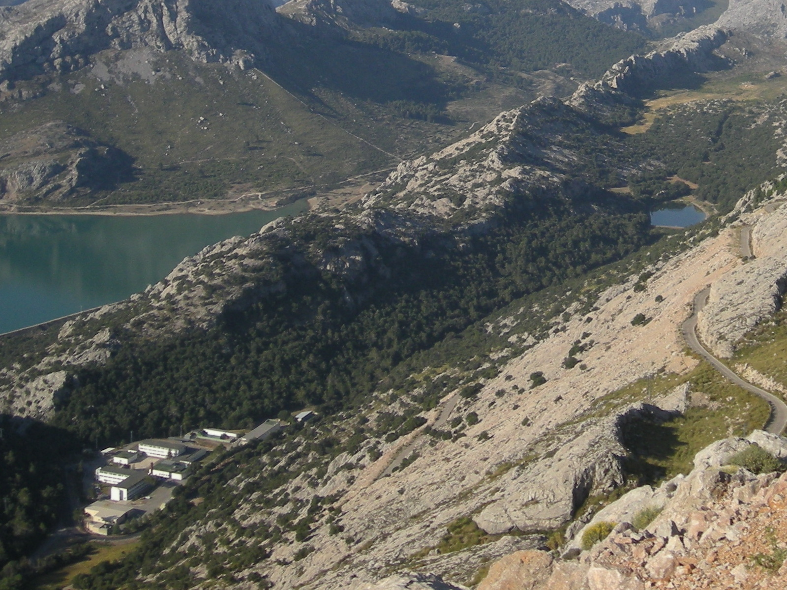 Serra de Cúber. Des del Puig Major. Escorca, Mallorca.